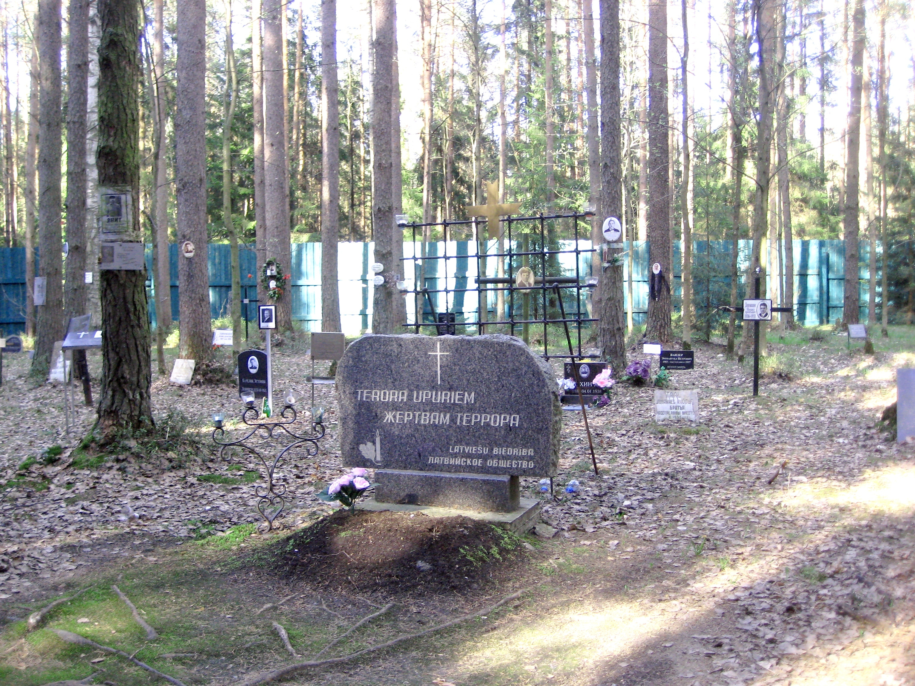 Санкт-Петербург. Левашовское мемориальное кладбище ("Левашовская пустошь"). Памятник латышам - жертвам репрессий